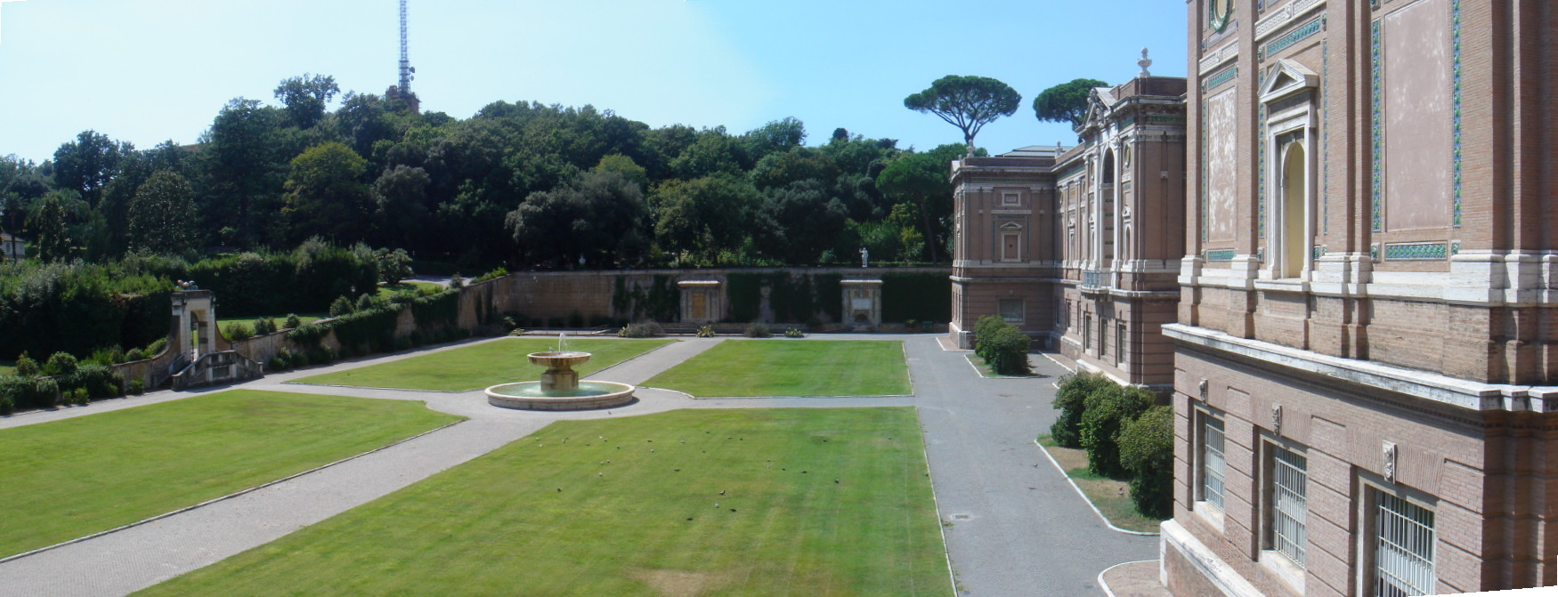 Pinacoteca del Museo Vaticano, Città del Vaticano. Vista verso il Colle Vaticano con il bosco del Giardino Vecchio.